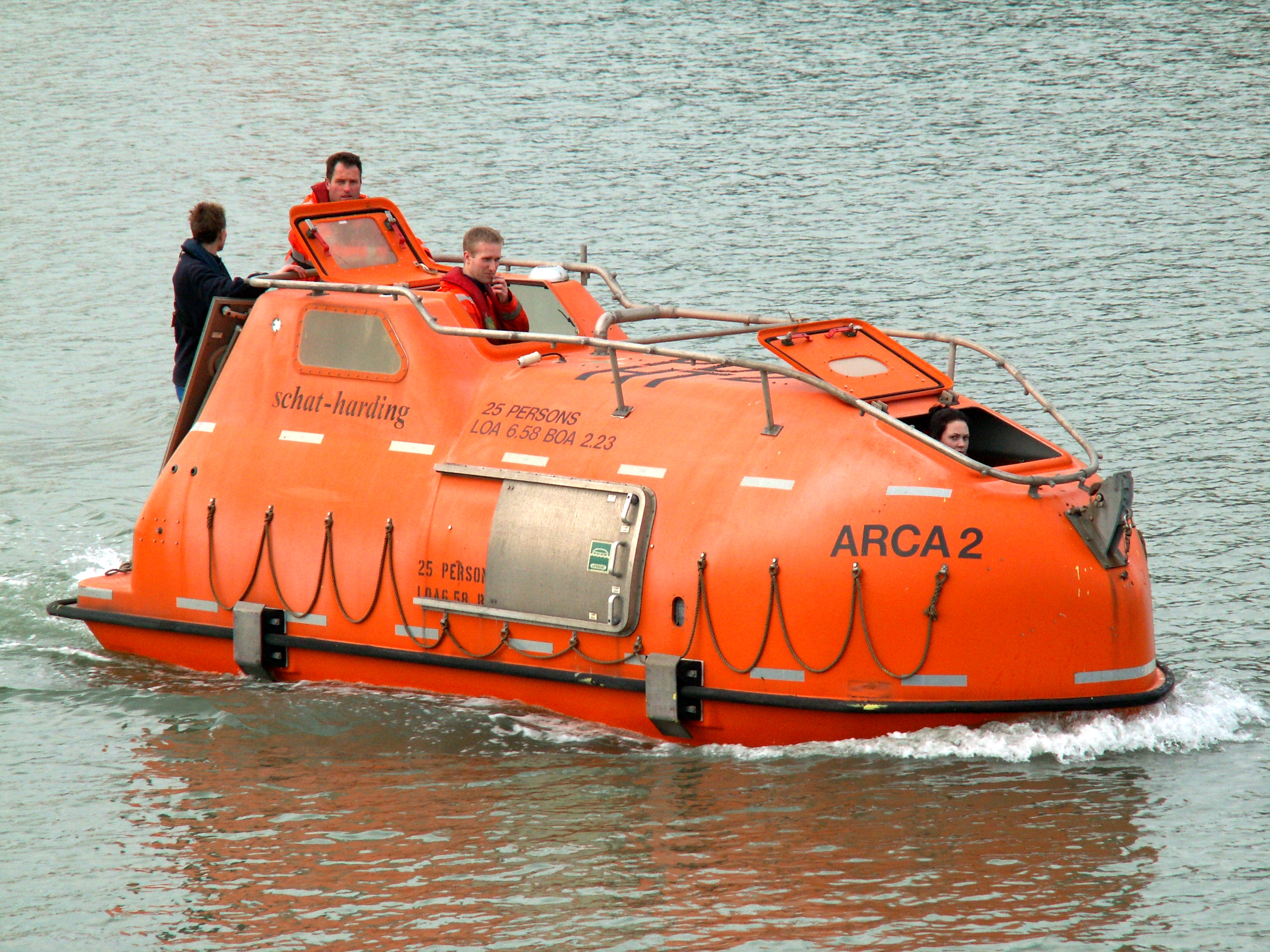 Rescue vessel of Arca IMO 9167966